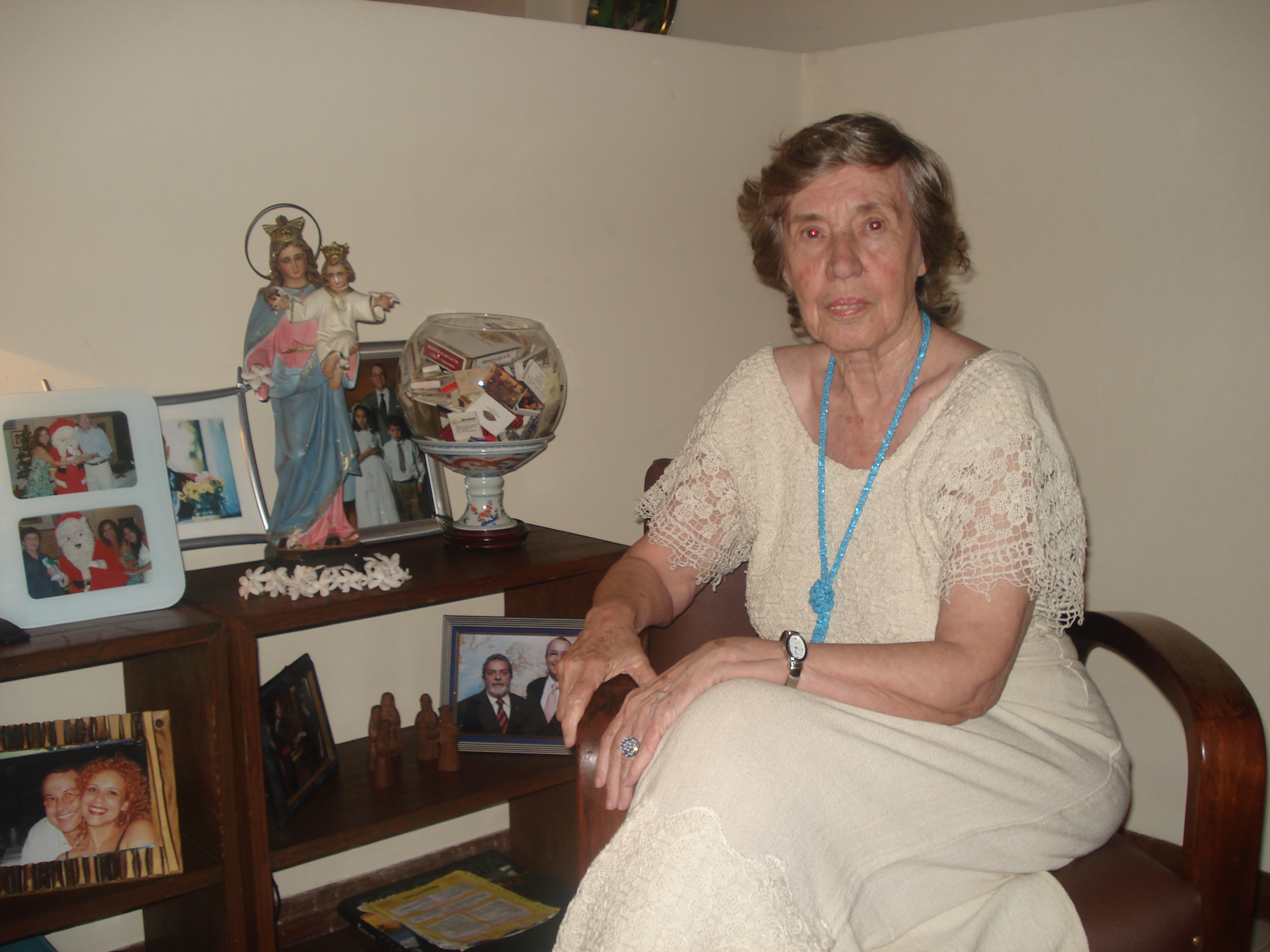 Elsa Wiezell